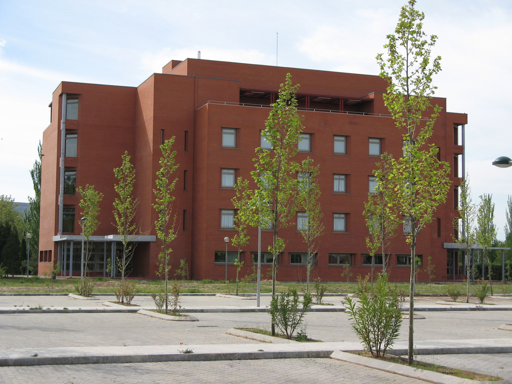 Antiguo aulario. Actualmente Facultad de Ciencias Ambientales Universidad de Alcalá, España.